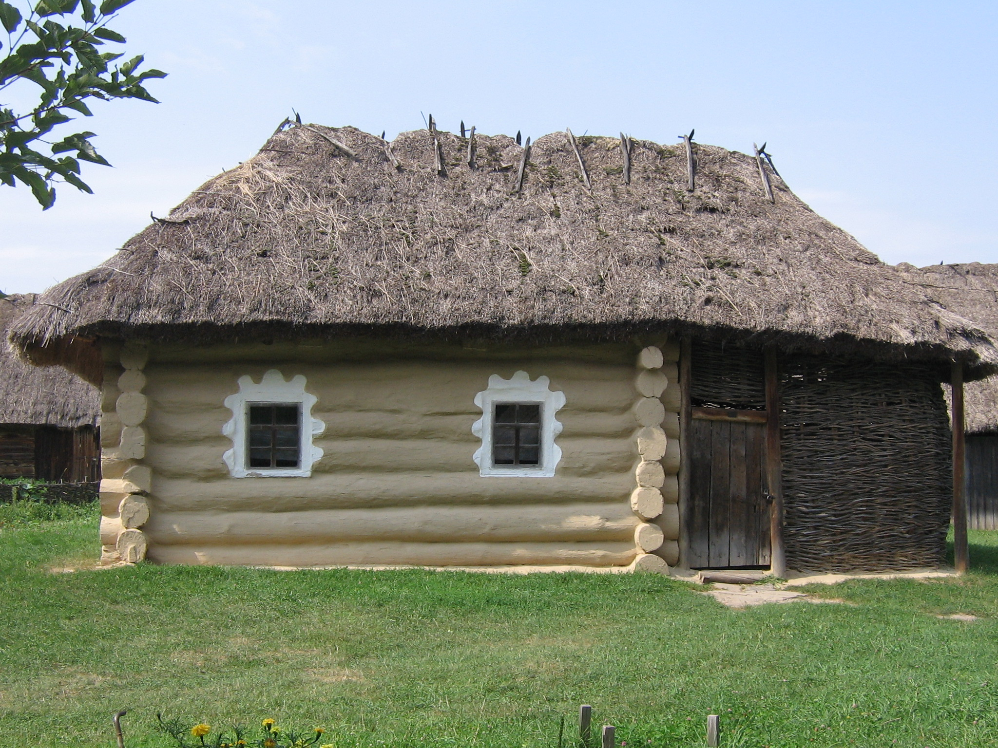 Хата. Кінець ХІХ ст. с.Мамекине Чернігівської обл